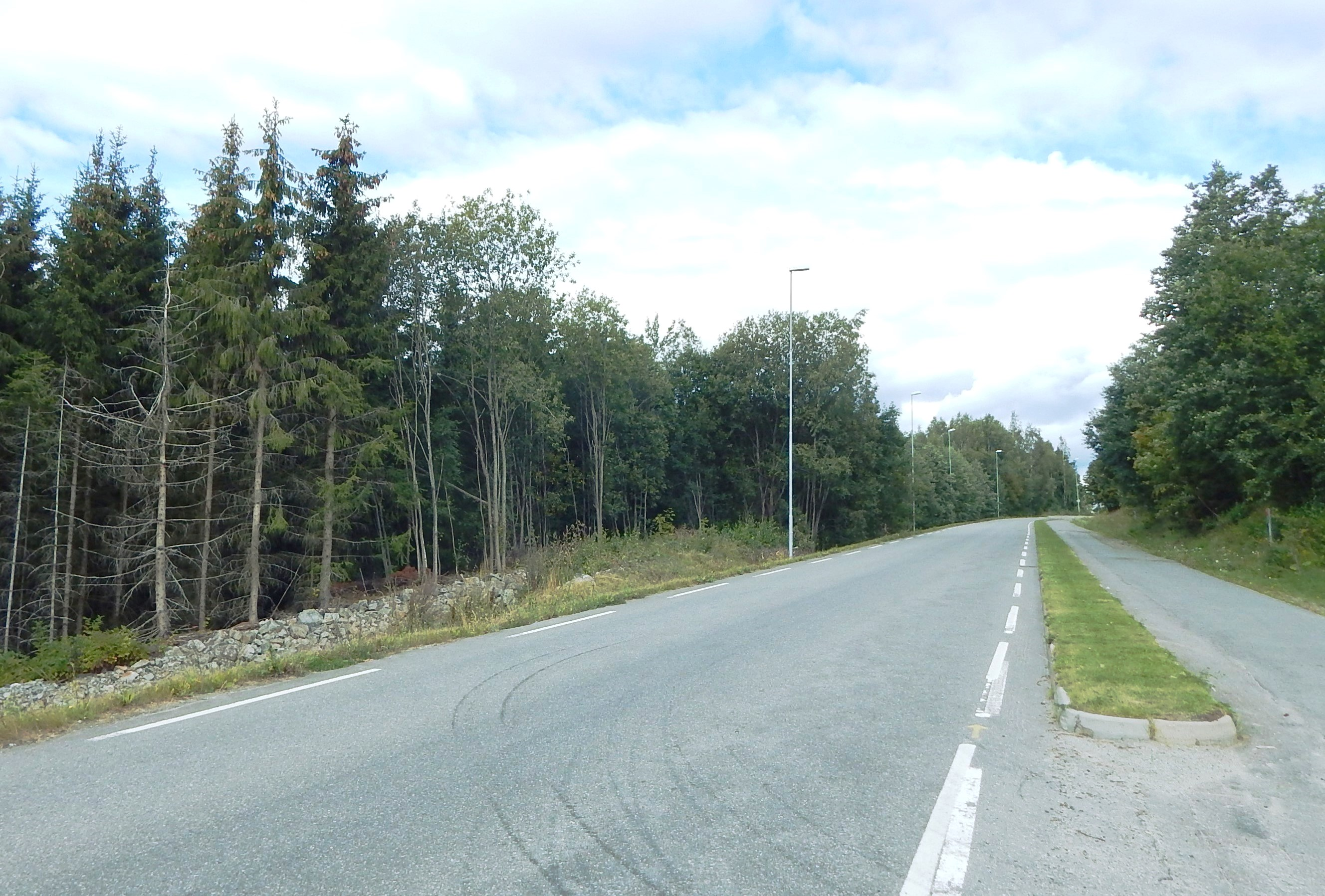 Nordåsvegen (FV1718, tidl. FV52) i Brumunddal